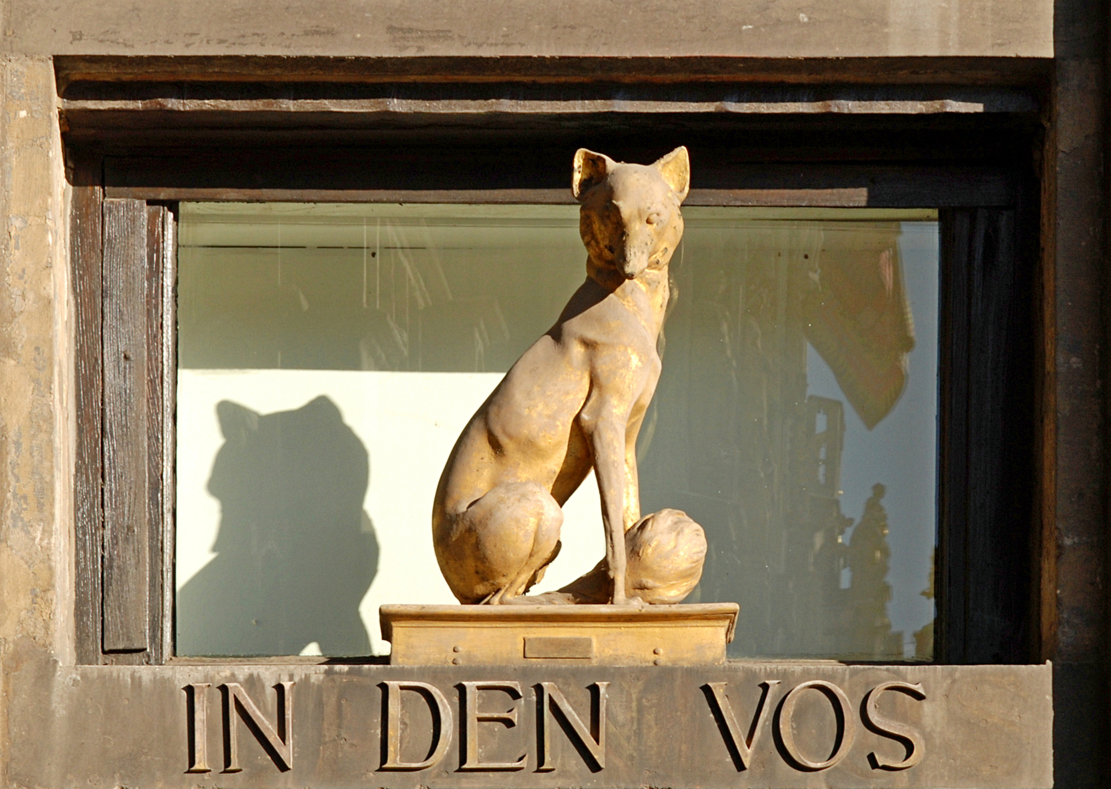 Belgique - Bruxelles - Grand-Place - Maison du Renard